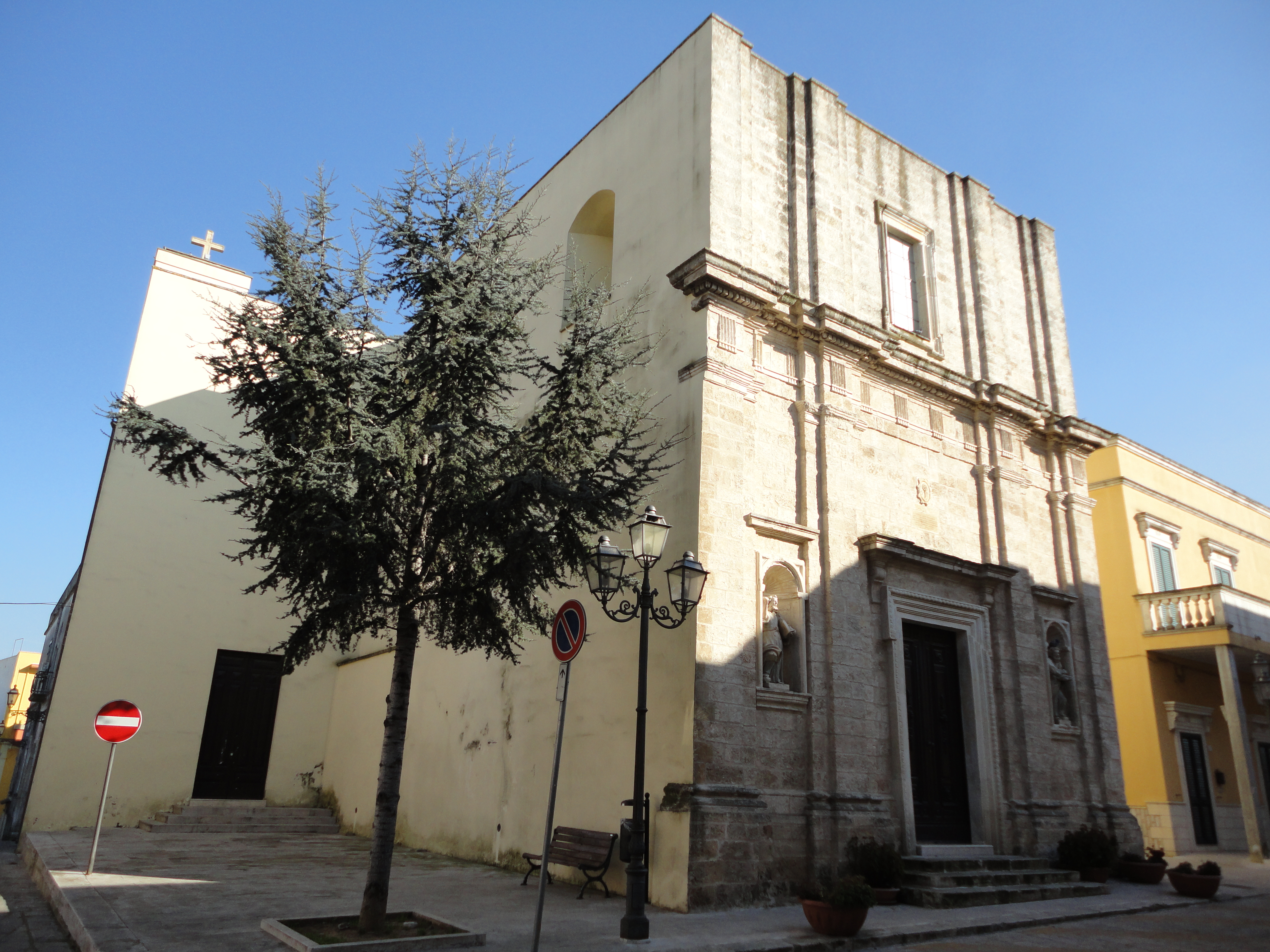 Chiesa San Michele Arcangelo Supersano, Lecce